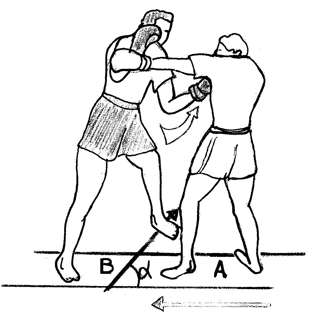 uppercut5.jpg